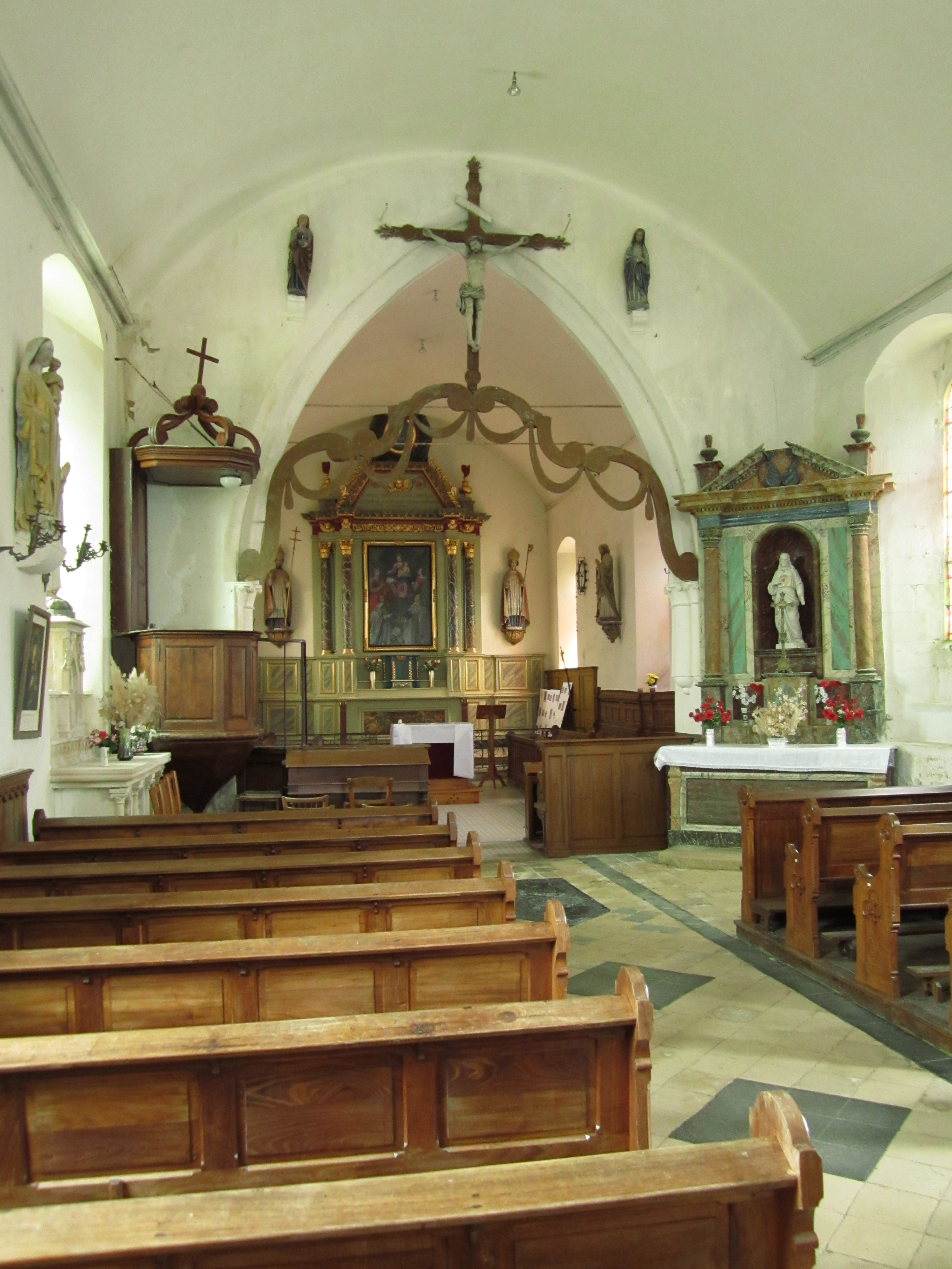 église Saint-Martin de Golleville